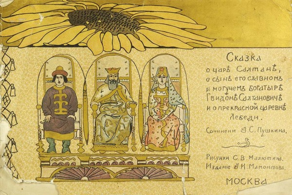 Сказка о царе Салтане. 1899. Рисунки С.В. Малютина. Издание А.И. Мамонтова